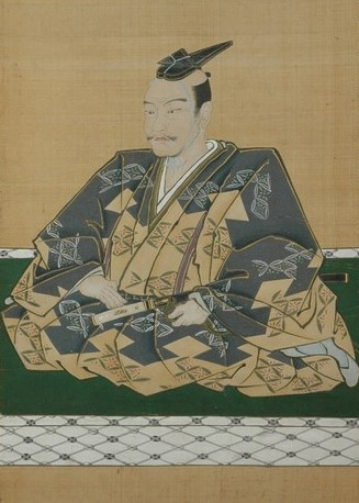 加藤正方の肖像。